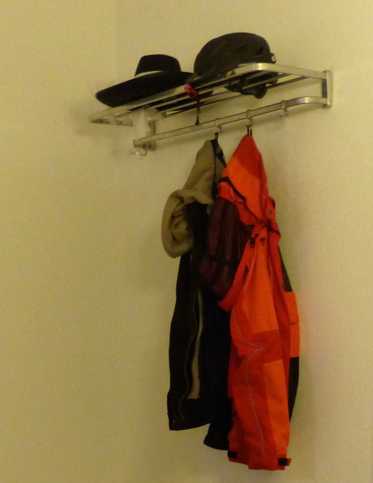 Einrichtung des Lokal K am 8. Mai 2014: Garderobe